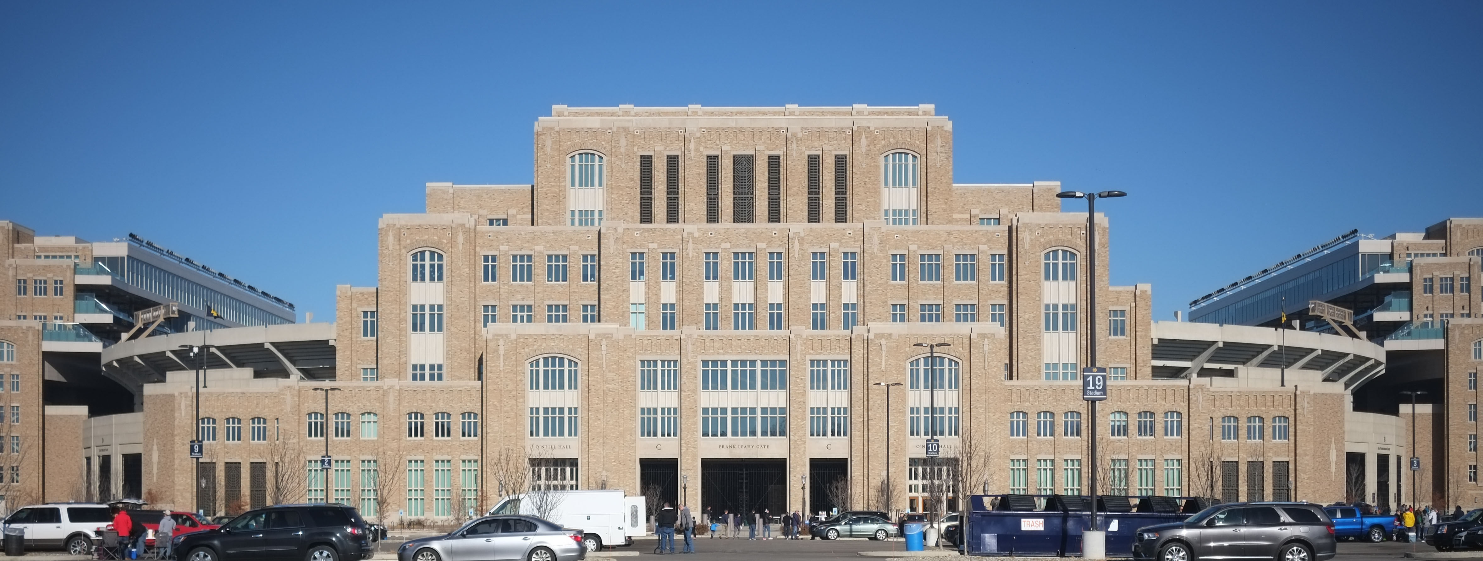 Notre Dame Stadium